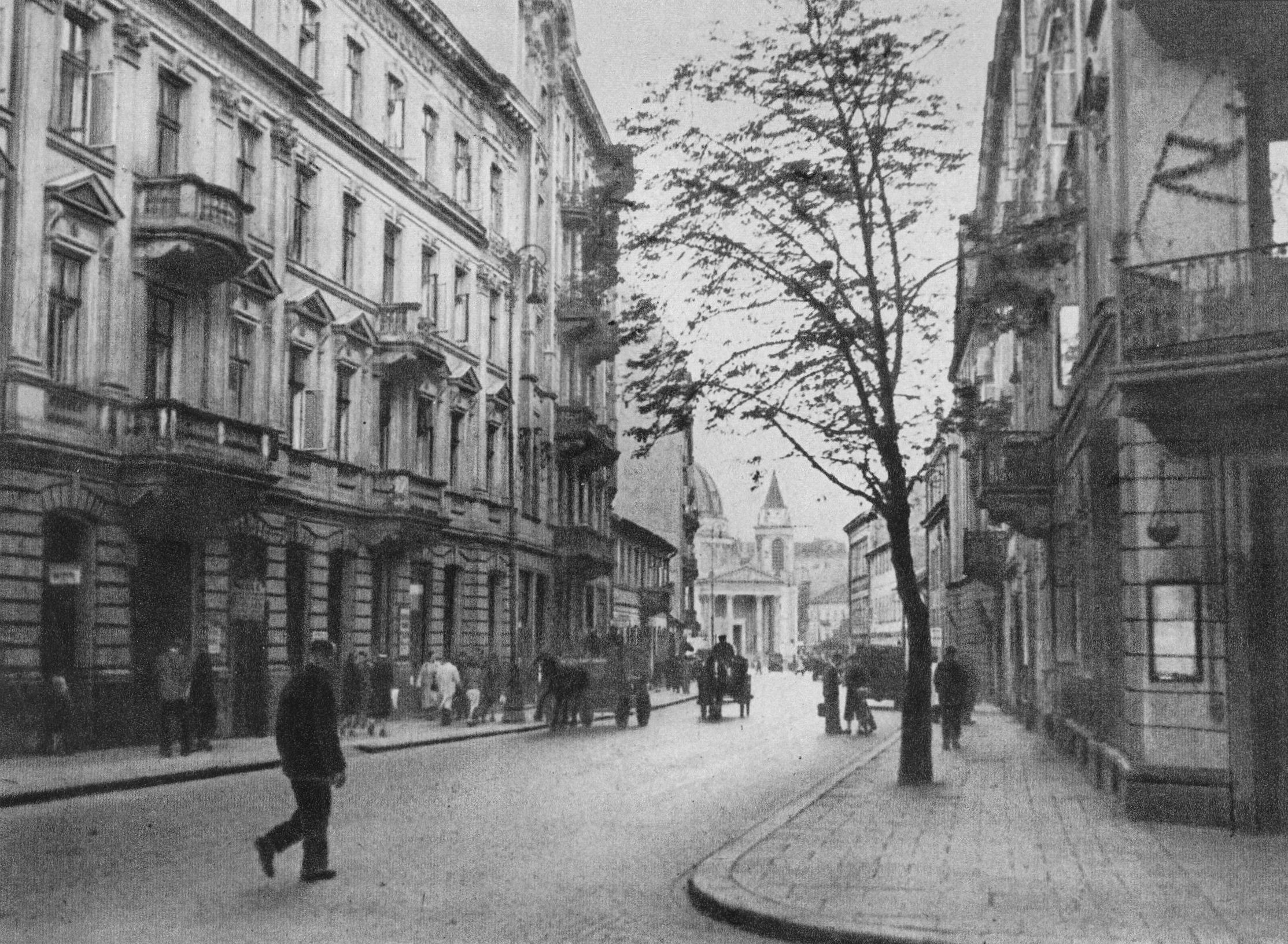 lica Mokotowska przy Wilczej w Warszawie